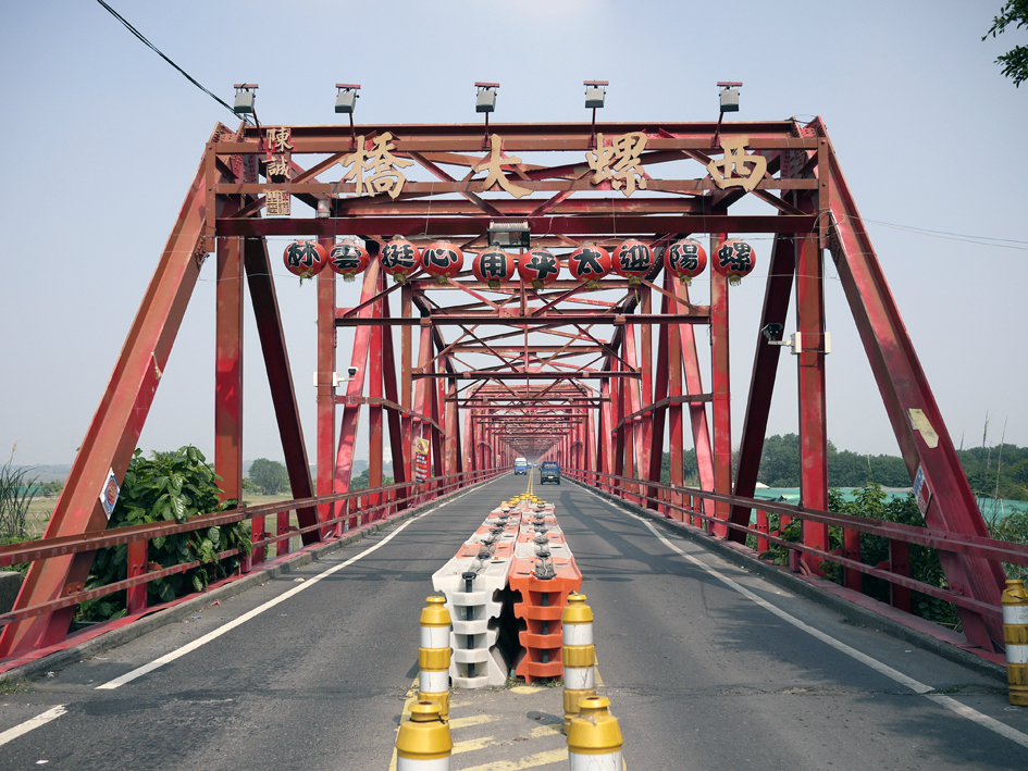 舊西螺大橋